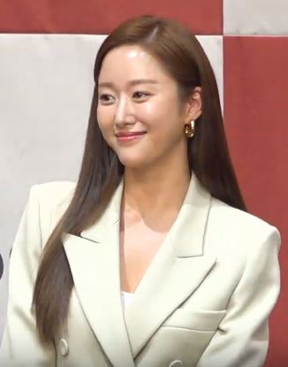 TV조선 특별기획 드라마 '레버리지: 사기조작단' 제작발표회가 10일 오후 서울 구로구 신도림 라마다호텔 열렸다.